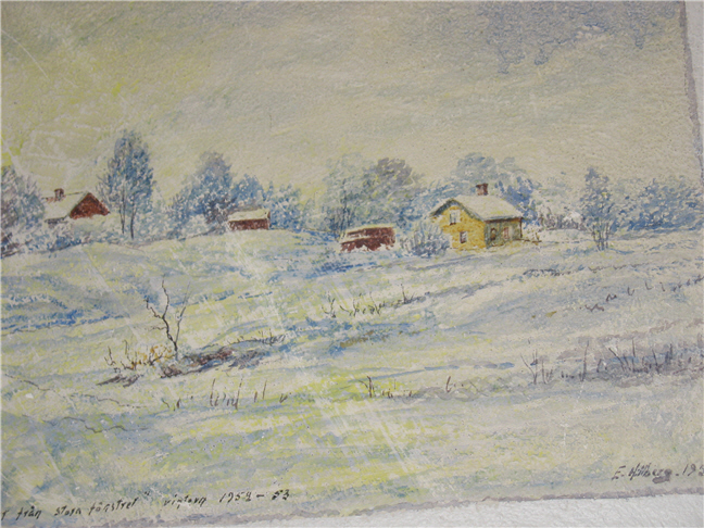 Fresk av Einar Hillberg föreställande utsikten från sonen Oves hus, vintern 1952-1953. En av de fresker som Einar Hillberg målade i sin sons, Ove Hillbergs, nybyggda hus i Eskiltuna 1953.